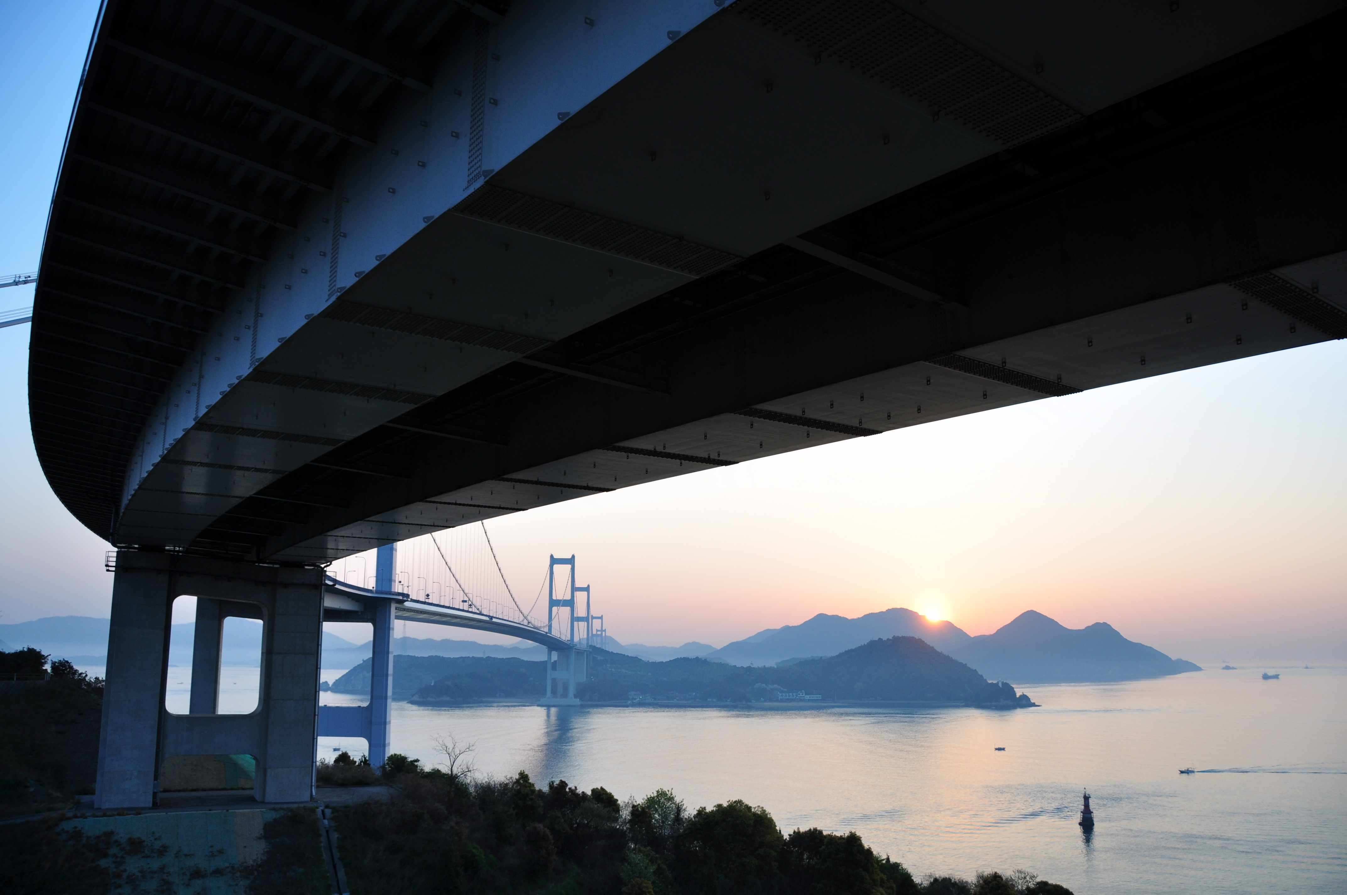 Kurushima-Kaikyo Bridge sunset